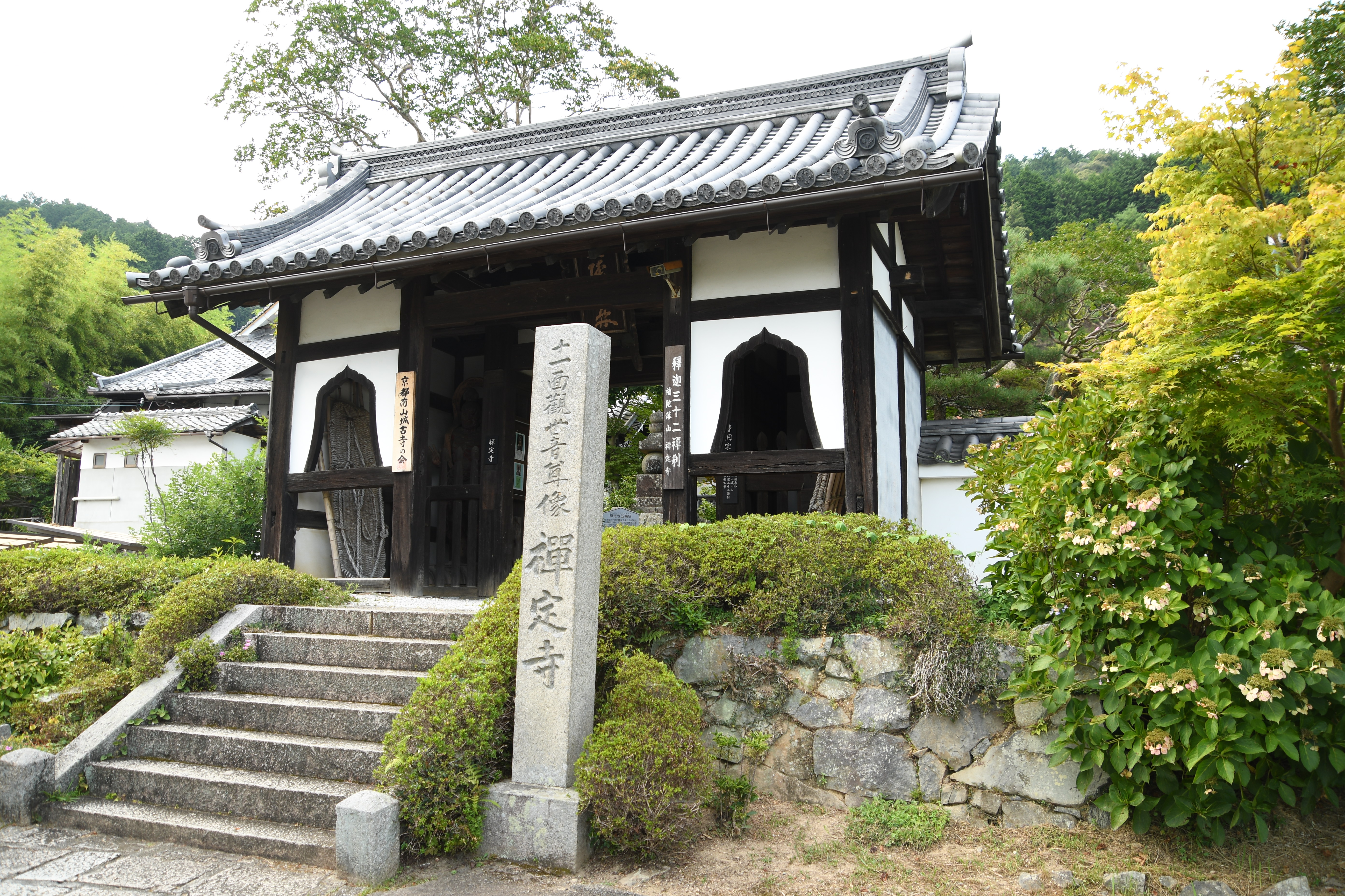 京都府宇治田原町禅定寺庄地 禅定寺。2018年8月5日撮影。